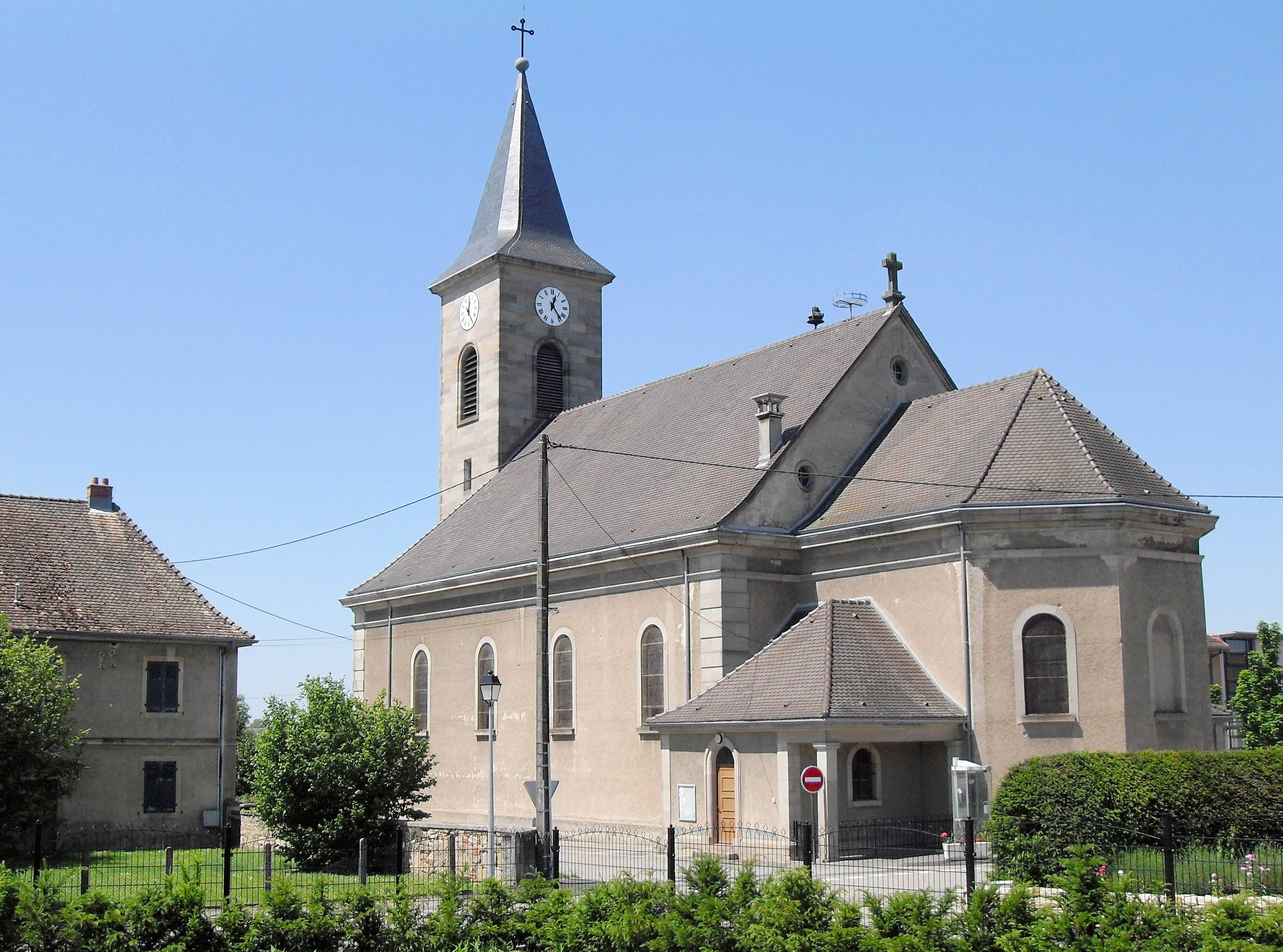 L'église Saint-Bernard à Saint-Bernard